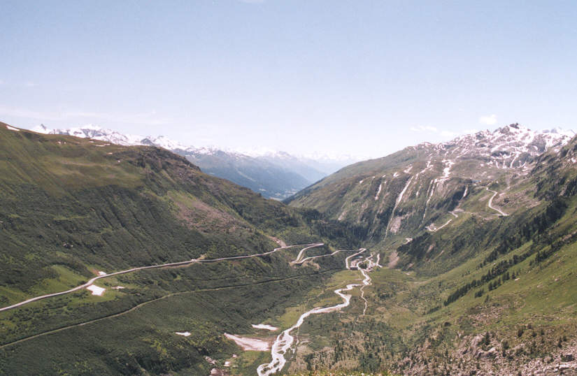 Vanaf het Belvedere uitzicht over de spoorlijn van de DFB, de Furkapas, Gletsch en de Grimselpas. Foto zomer 2001, Angélique Leunissen